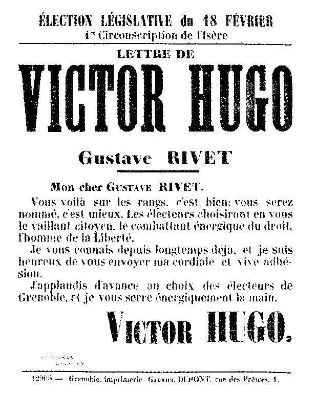 Affiche pour l'élection législative de février 1883 à Grenoble. Victor Hugo soutient Gustave Rivet.